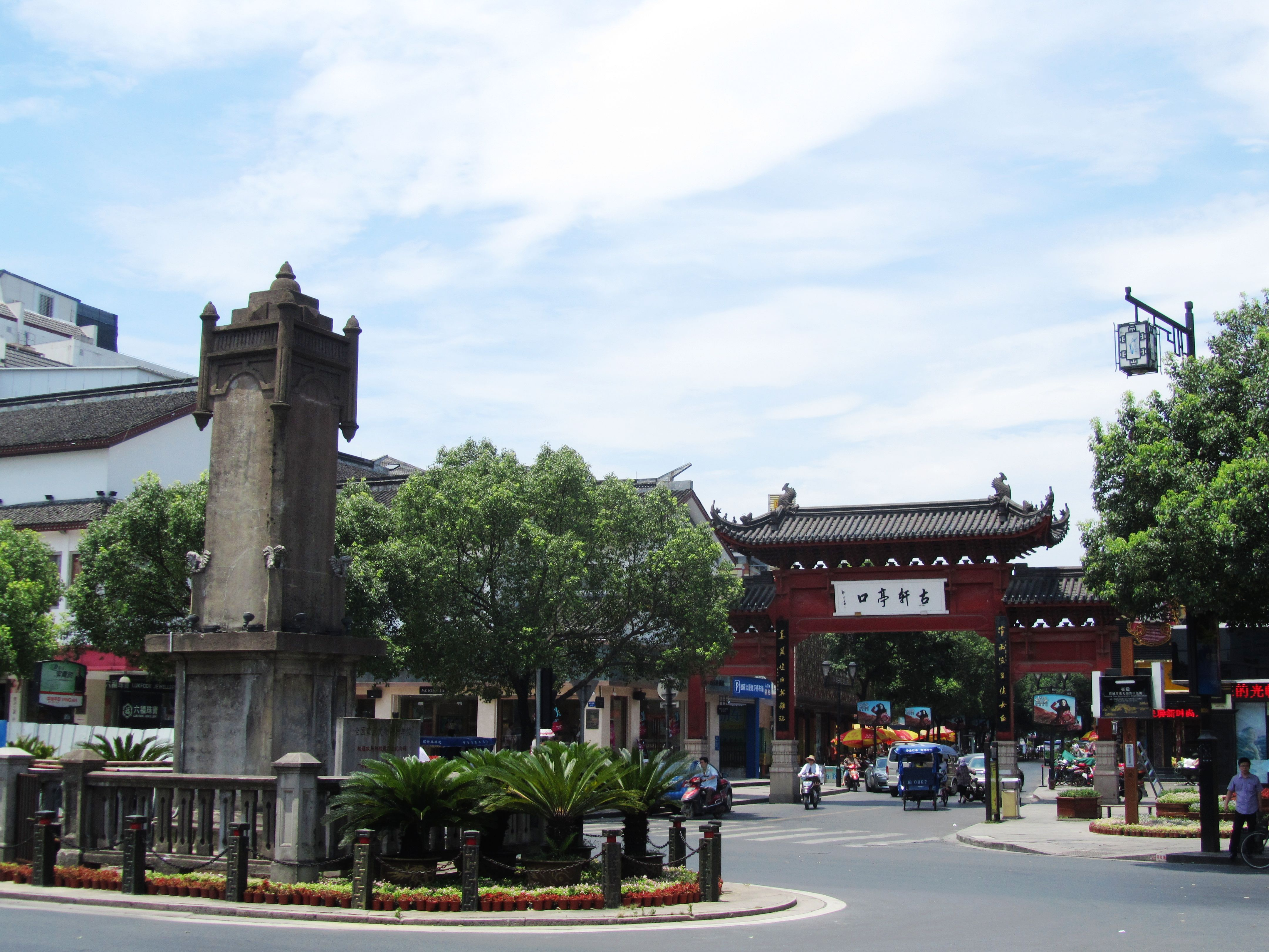 秋瑾烈士纪念碑及古轩亭口牌坊。